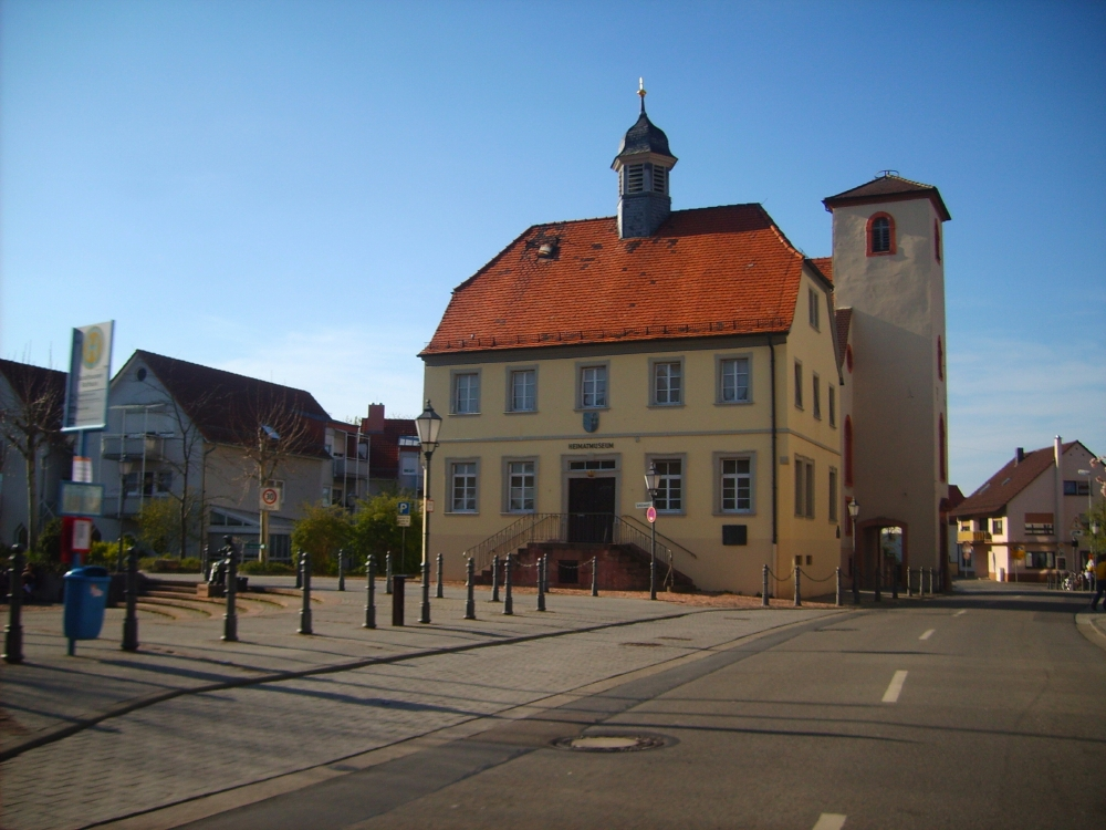 Altes Rathaus, Sandhausen, Germany